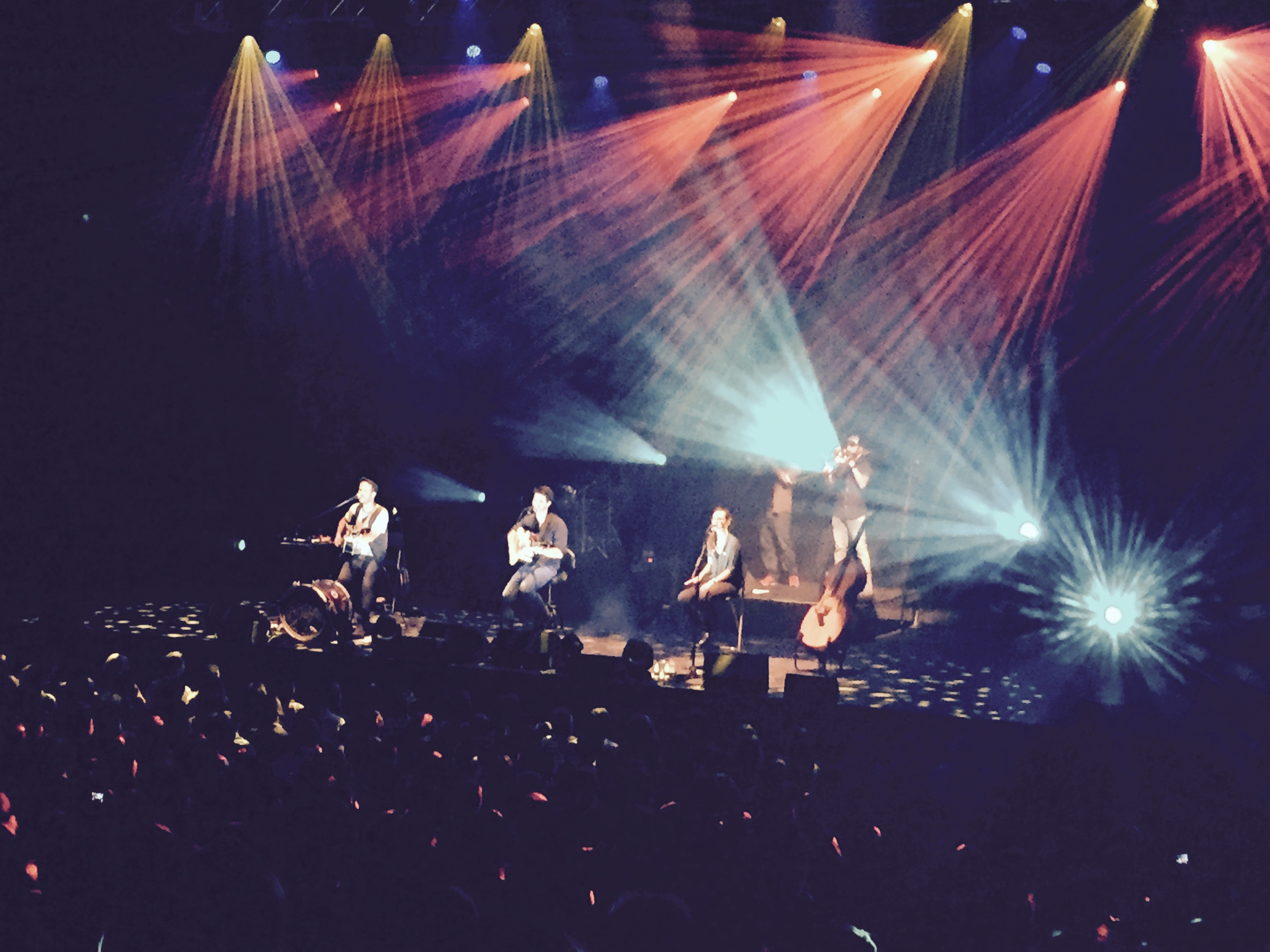 Concert del grup "Els Catarres" al Festival de Música de Cap Roig (08-08-2016)